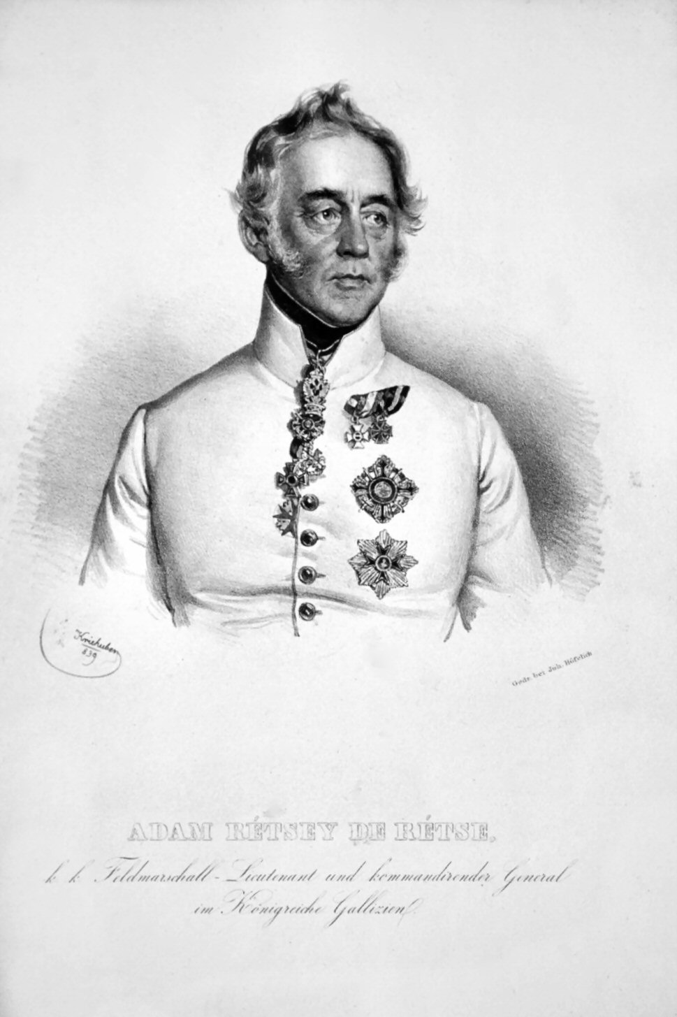 Adam Rétsey de Retse (1775-1852), k. k. Feldzeugmeister, Ritter des Maria-Theresien Ordens. Lithographie von Josef Kriehuber, 1839